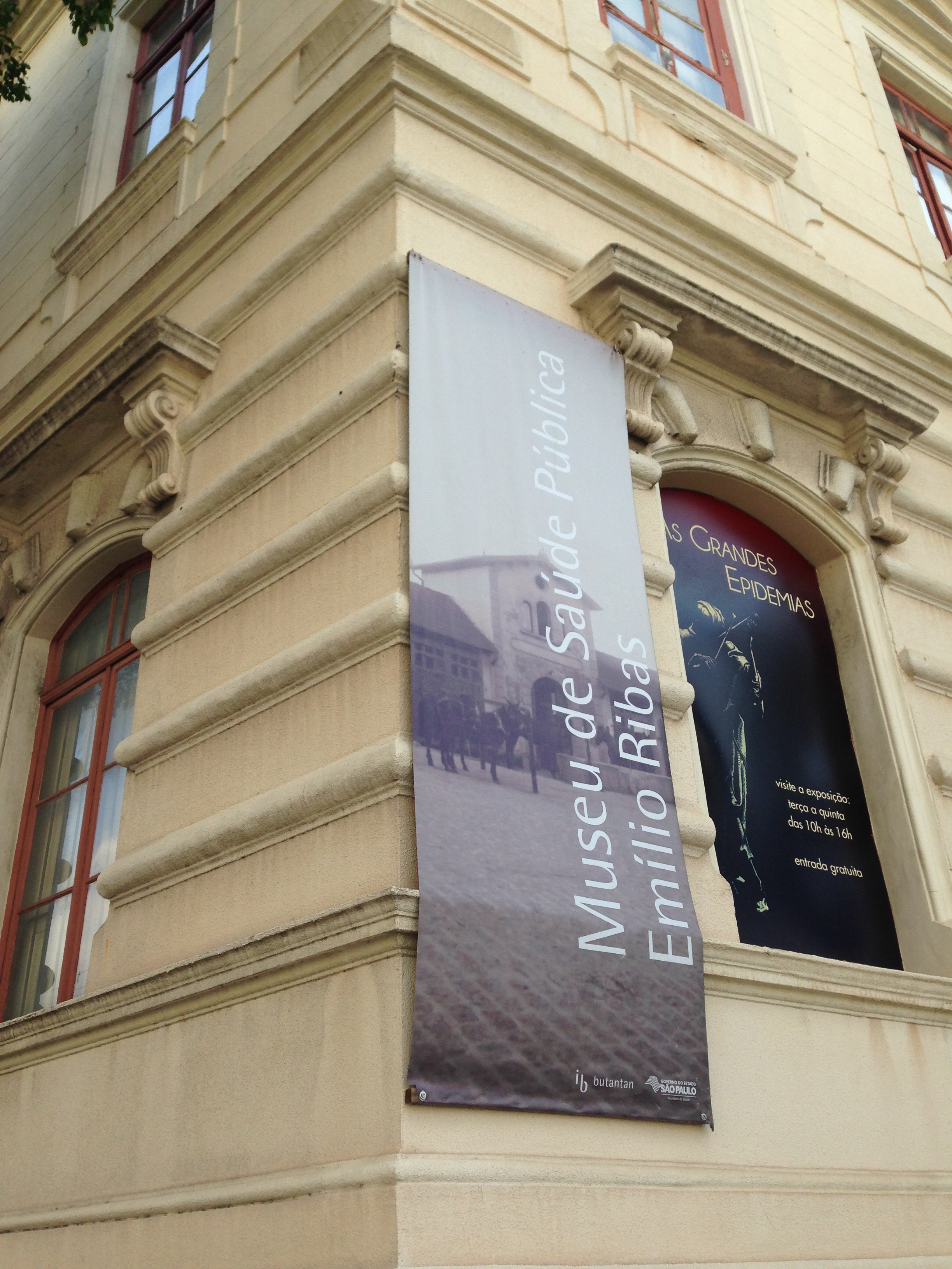 Entrada do museu.